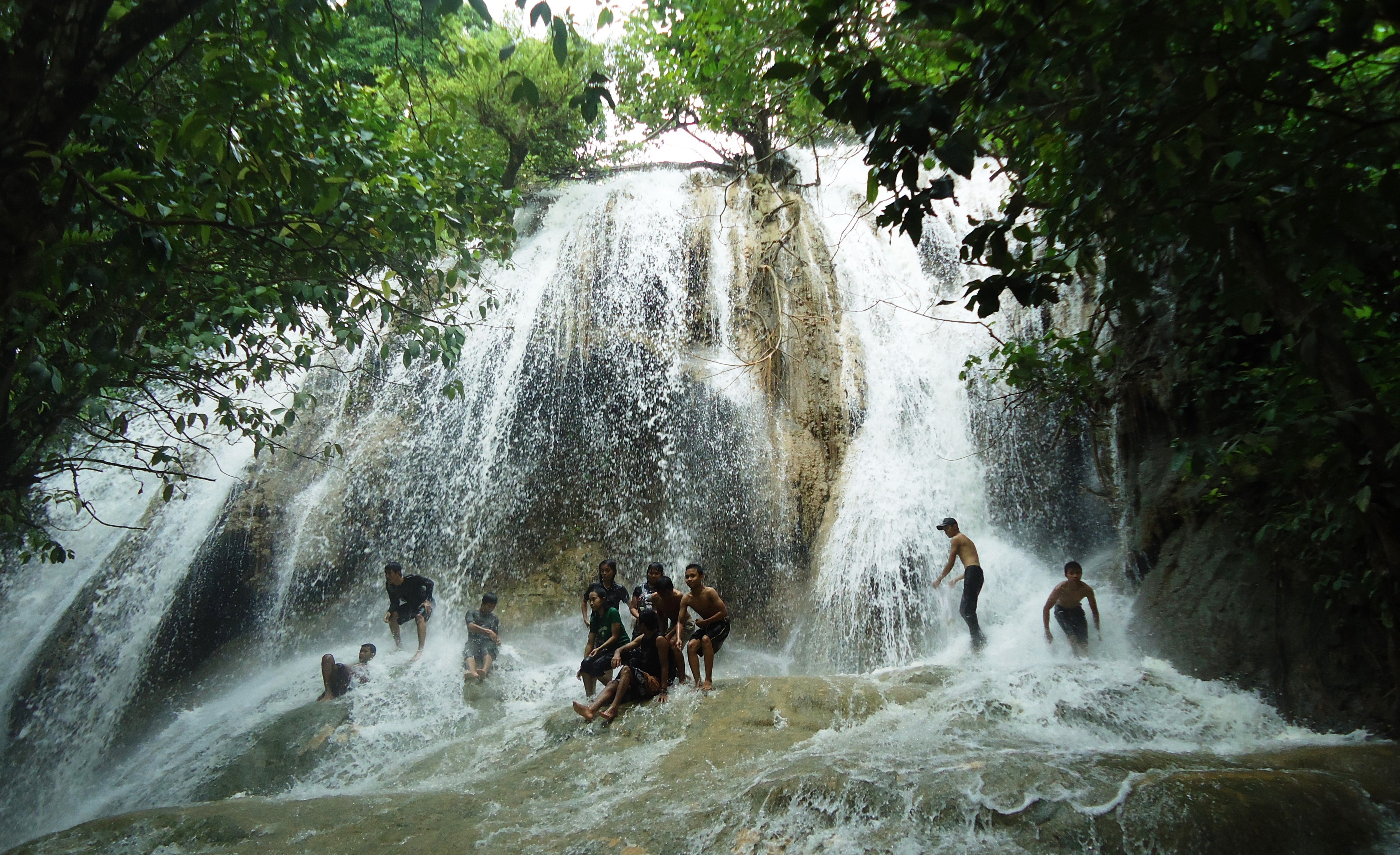 Air terjun Panggul, Trenggalek.